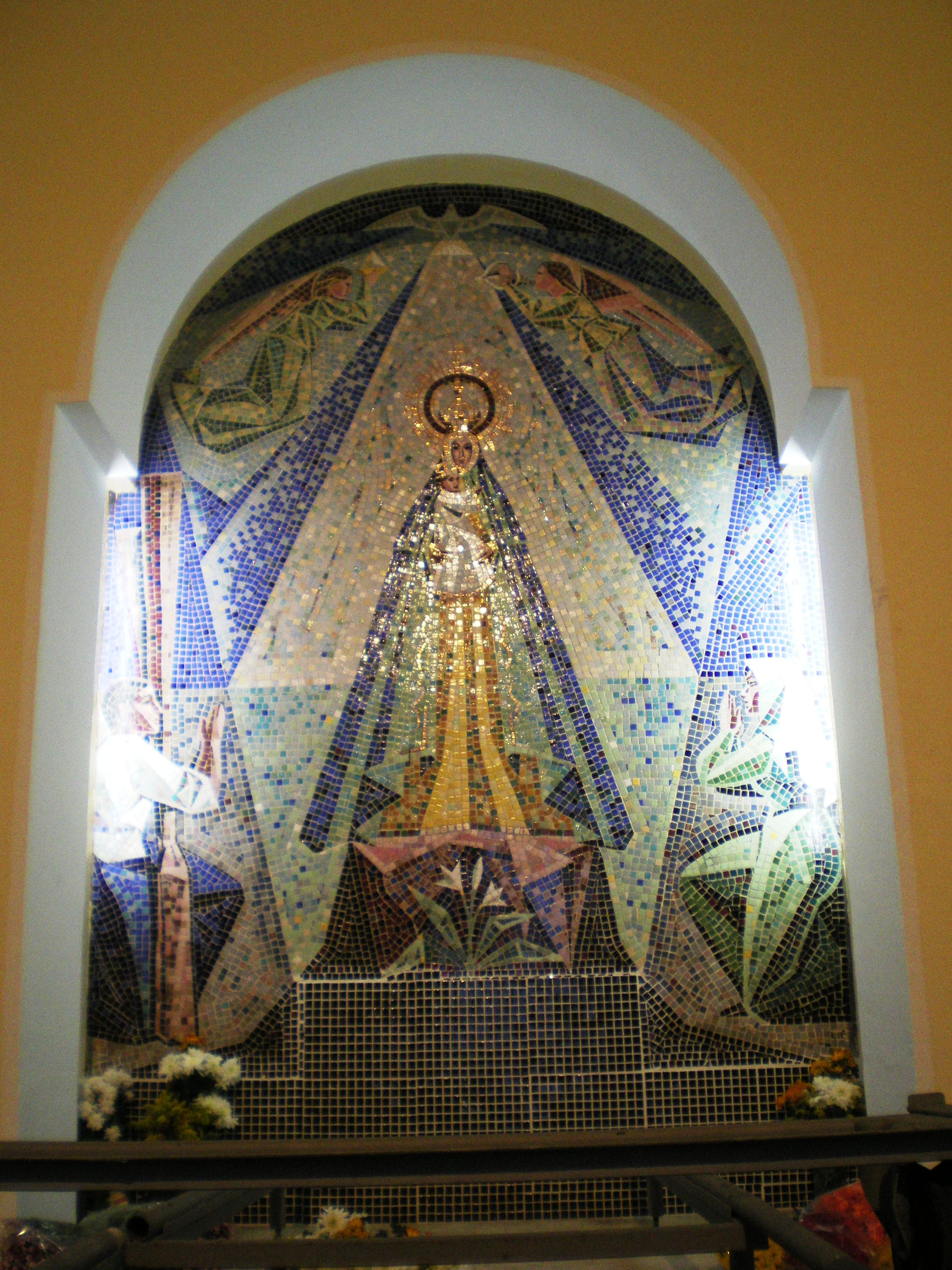 Fotografía del mosaico de la Virgen del Mar en el interior de la Ermita de Torregarcía, Almería, Andalucía, España, obra del artista Luis Cañadas Fernández, año 1953.